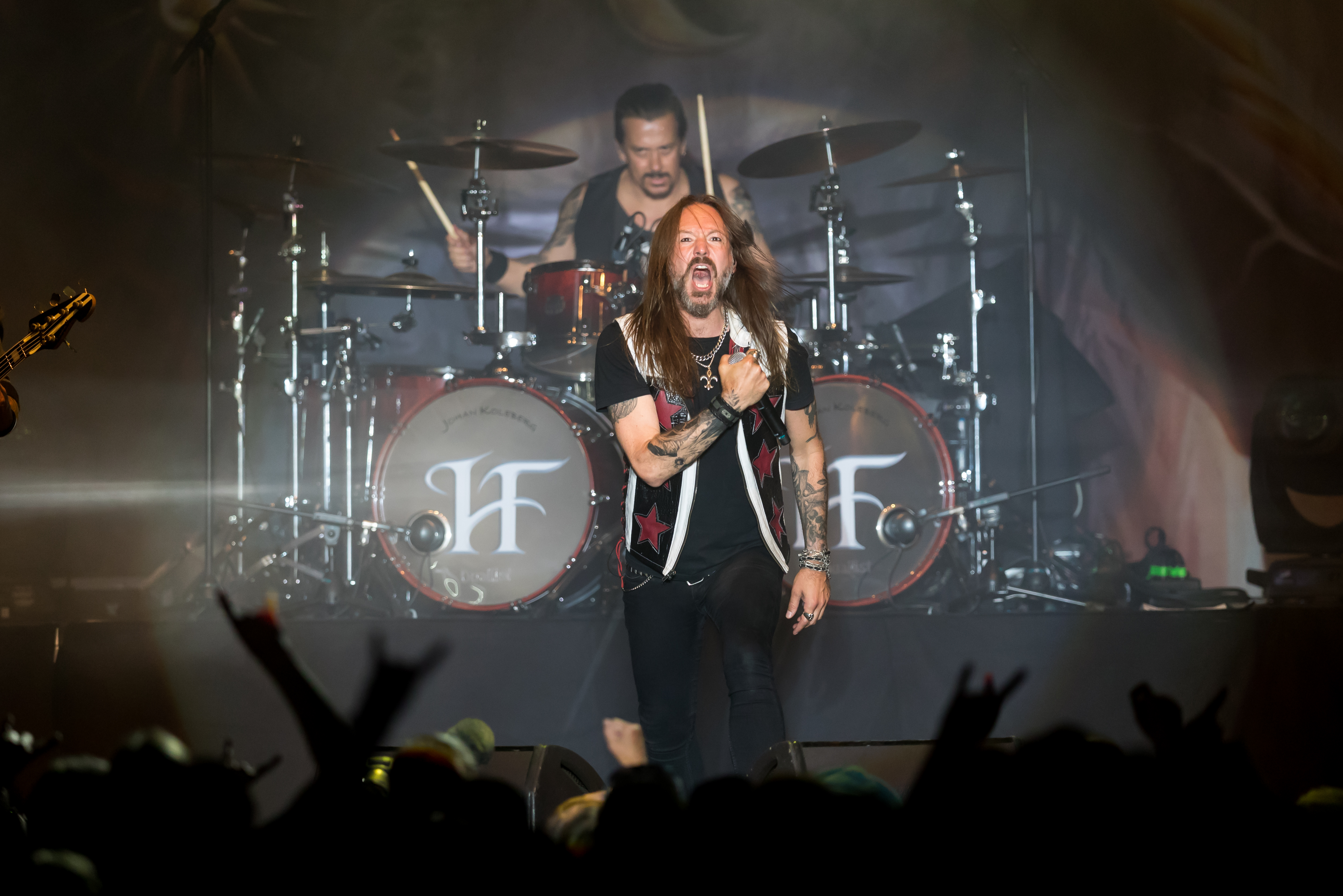 Hammerfall during Zeltfestival Rhein-Neckar at Maimarkt, Mannheim, Baden-Württemberg, Germany on 2017-06-24, Photo: Sven Mandel